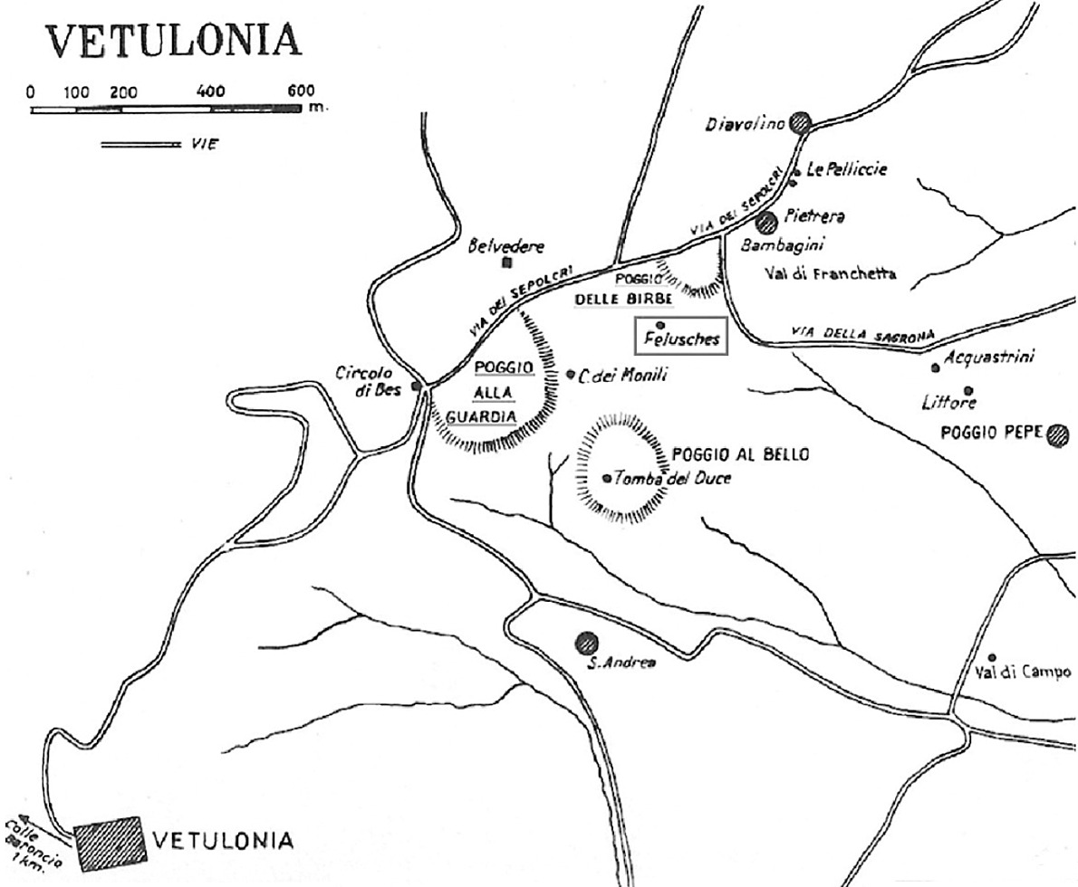 Necropoli di Vetulonia